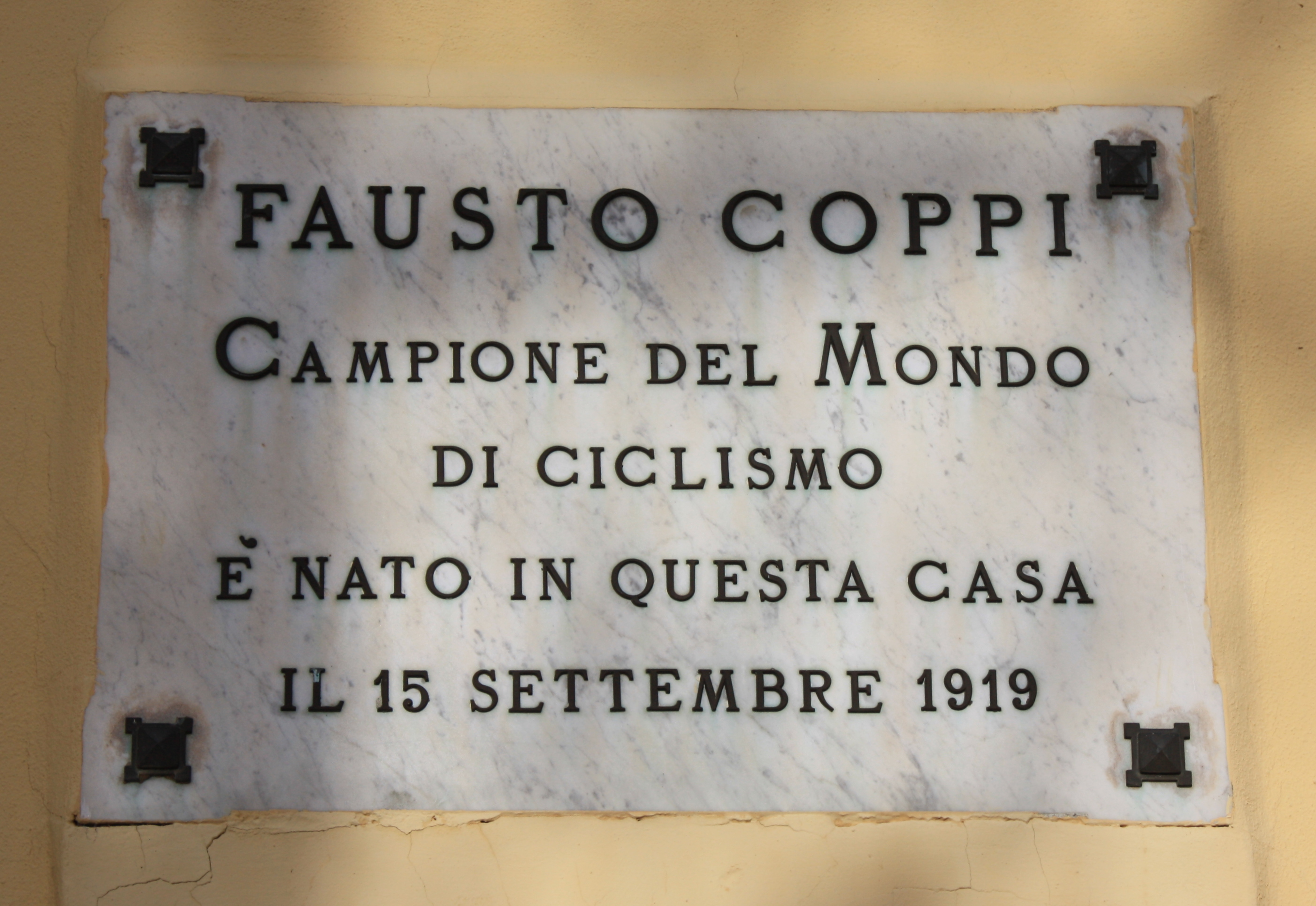 Lapide dedicata alla nascita di Fausto Coppi nella sua casa natale a Castellania il 15 settembre 1919.